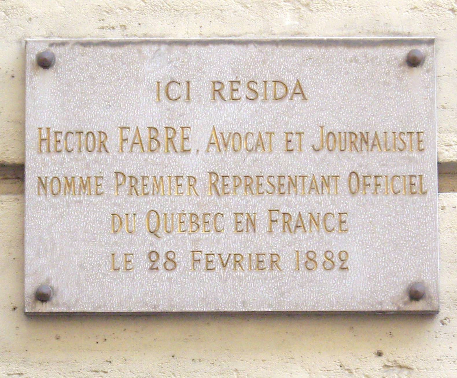 Plaque apposée au n° 6 de la rue Chabanais, Paris 2e, où résida le commissaire général du Canada à Paris, Hector Fabre (1834-1910), à partir de 1882.